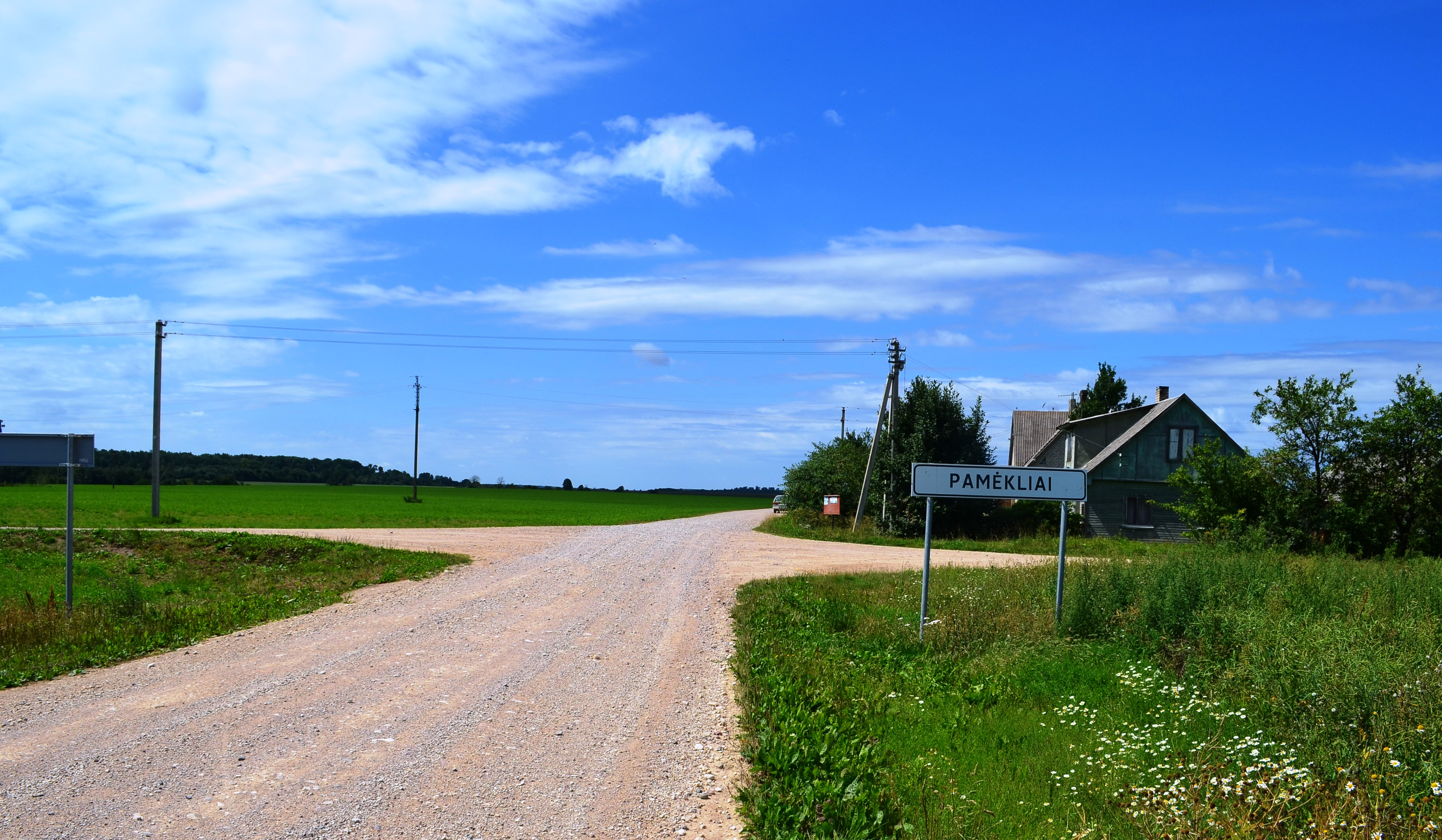 Pamėkliai nuo Saviečių pusės. Kėdainių raj.